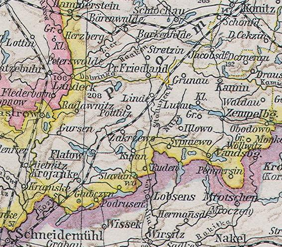 Karte:Kreis Flatow 1890, Ausschnitt aus File:Ost-_und_Westpreussen.jpg